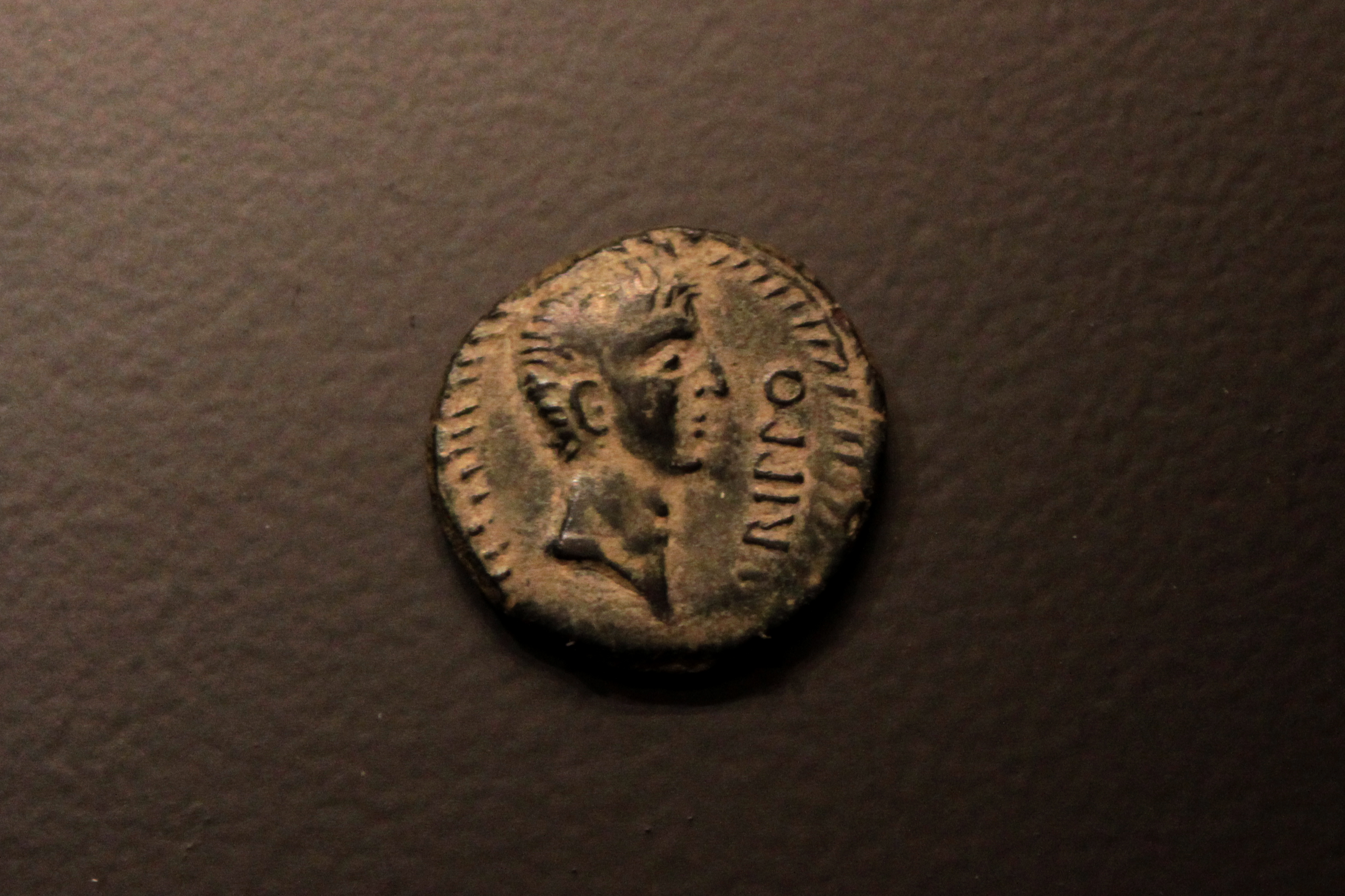 Semir de Irippo de los siglos II al I aC. Depositada en el Museo de Prehistoria de Valencia, Comunidad valenciana, España.